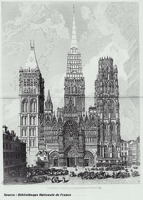 Cathédrale de Rouen/gravure/libre de droit Dessin de 1822 ; Source : bibliothèque nationale de France, Contents 1 Summary 2 Licence : Libre de droit 3 Licensing 4 Original upload log Summary Auteur(s) : Dessinateur Titre(s) : [Illustrations de Architectural Antiquities of Normandy] [Image fixe numérisée] / J.S. Cotman, dess. et aut. du texte Type de ressource électronique : Publication : Londres : J. et A. Arch. Cornhill, 1822 Description matérielle : 100 est. : taille-douce et burin : n. et b. ; 50 x 35 cm et moins Note(s) : Acq. : BNRéserve Source : Dans"Architectural Antiquities of Normandy"/ J.S. Cotman, Londres, J. et A. Arch. Cornhill, 1822. L'ouvrage comprend 100 planches et 3 figures, toutes reproduites en 100 images numérisées d'après le microfilm R 122038. Paris. BNF (Magasin central des *Imprimés). Gr Fol Lj5 71 Domaine(s) : Architecture ; Typologie : imagerie du livre Notice n° : FRBNF38497773 Licence : Libre de droit Par autorisation explicite moyennant mention expresse du site. L'utilisation de cette image est libre à la seule condition de mentionner son auteur/origine